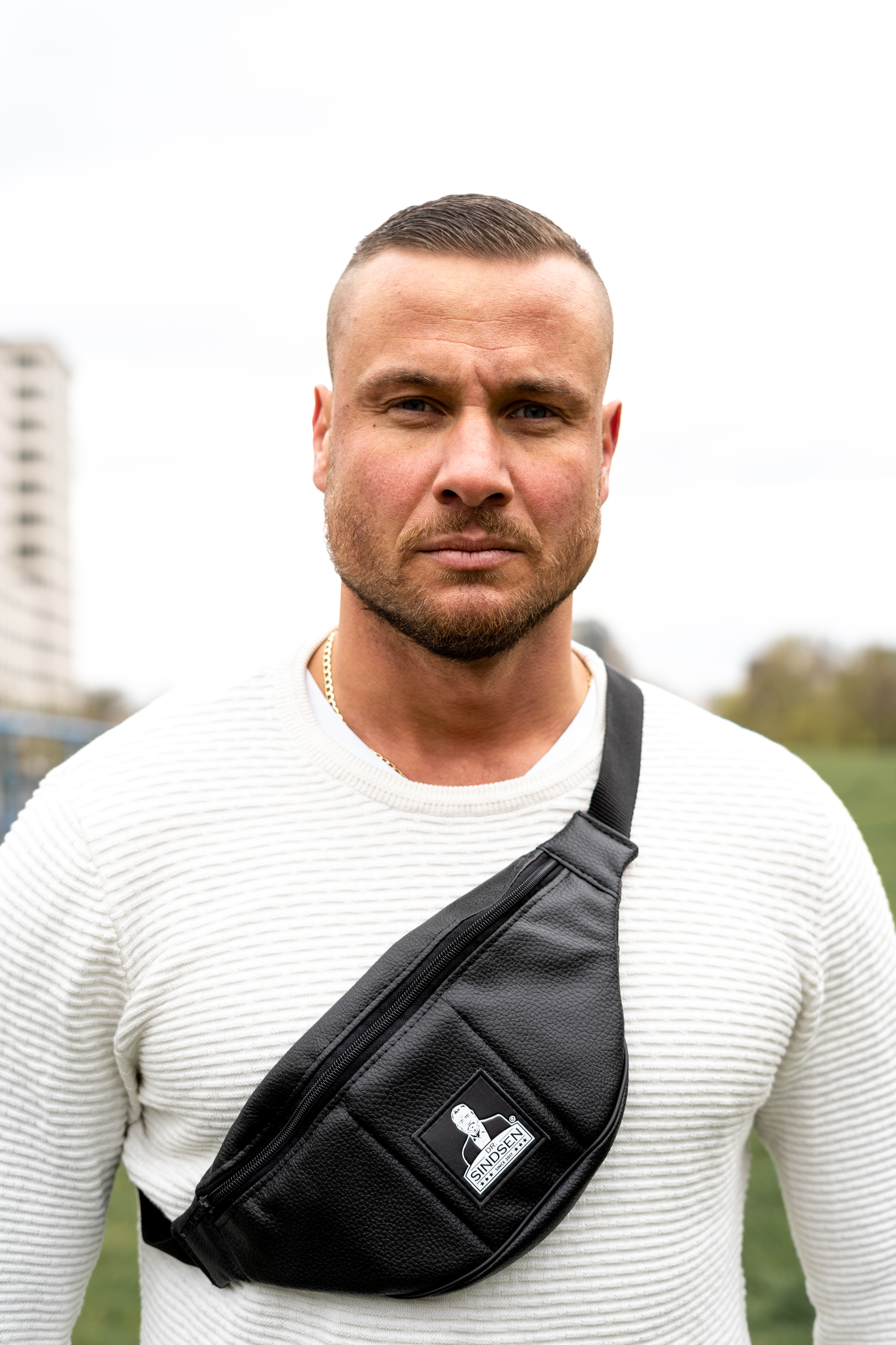 Das Foto wurde bei einem Shooting für das Berliner Modelabel ,,Dr.Sindsen" am 15.04.19 am Potsdamer Platz aufgenommen. Eric Sindermann ist der Inhaber von dem Modelabel ,,Dr.Sindsen".